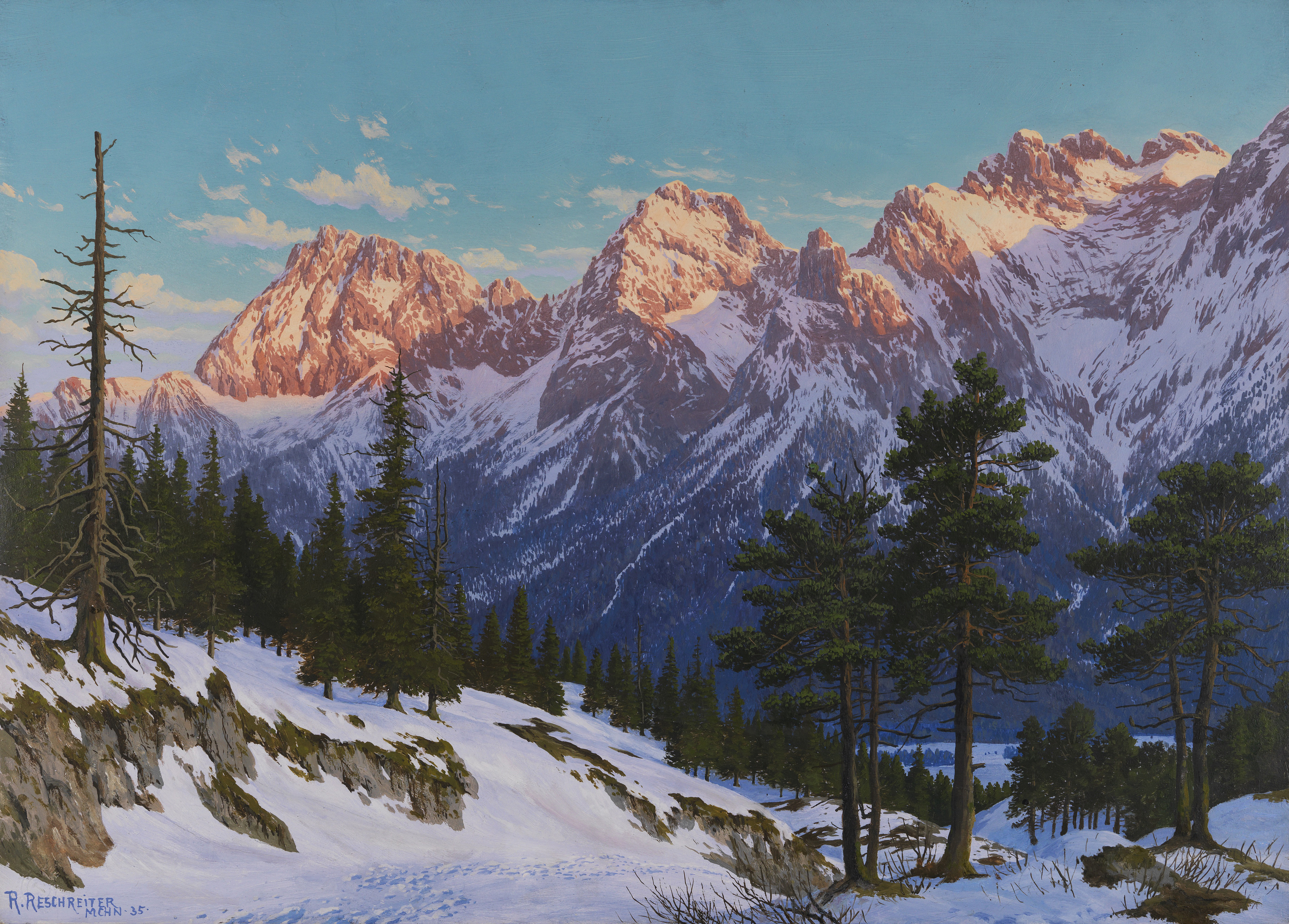 Winterliche Abendstimmung bei Mittenwald. Gouache. signiert, bezeichnet und datiert "MCHN. 35.". Auf Malpappe von Schöllershammer 49,6 x 68,8 cm (19,5 x 27 in)